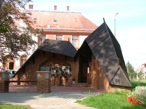 II.világháborús építmény kápolna?[1] (Eleőd Ákos, 1992.) [2] - Szeghalom, Szabadság tér-Petőfi Sándor utca.